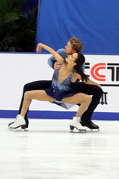 Мэдисон Чок и Эван Бейтс на Cup of China 2017.